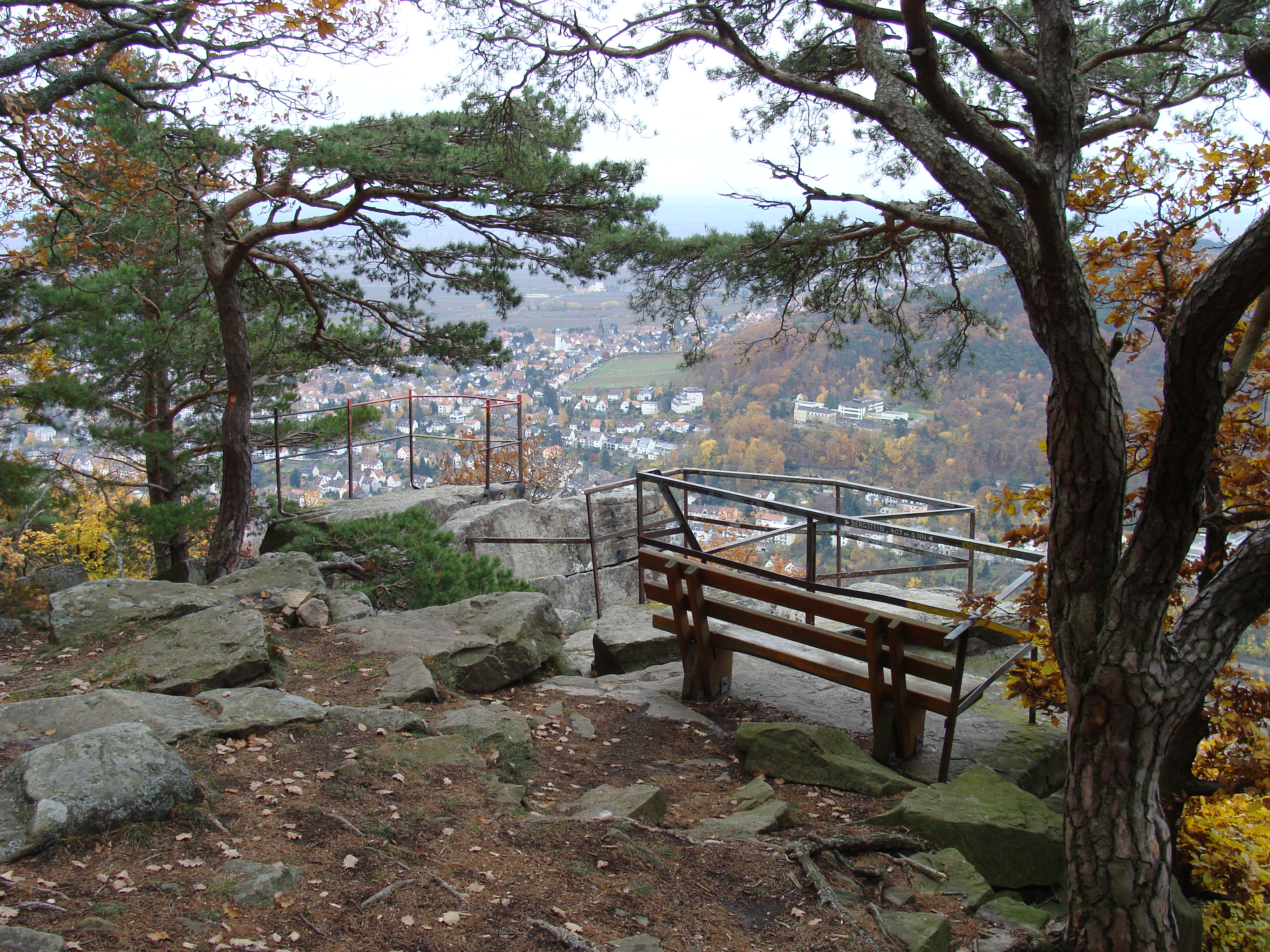 Bergstein (Weinbiet) im Pfälzerwald - Naturdenkmal in Rheinland-Pfalz